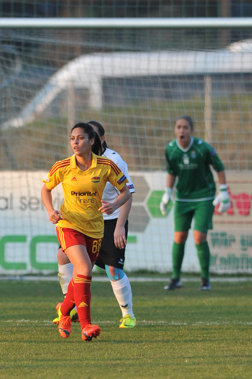 UEFA Women's Champions League 2013/14 SV Neulengbach - Tyresö FF Neulengbach, 29. März 2014 Mayara da Fonseca Bordin